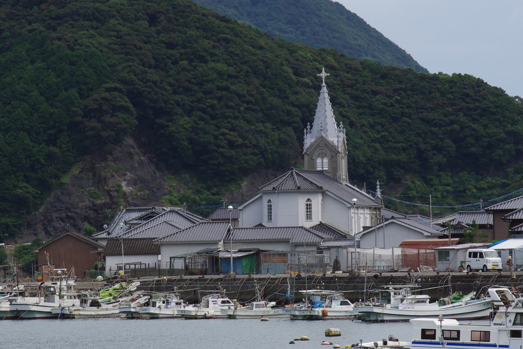 日本の渚百選「キリシタンの里崎津」